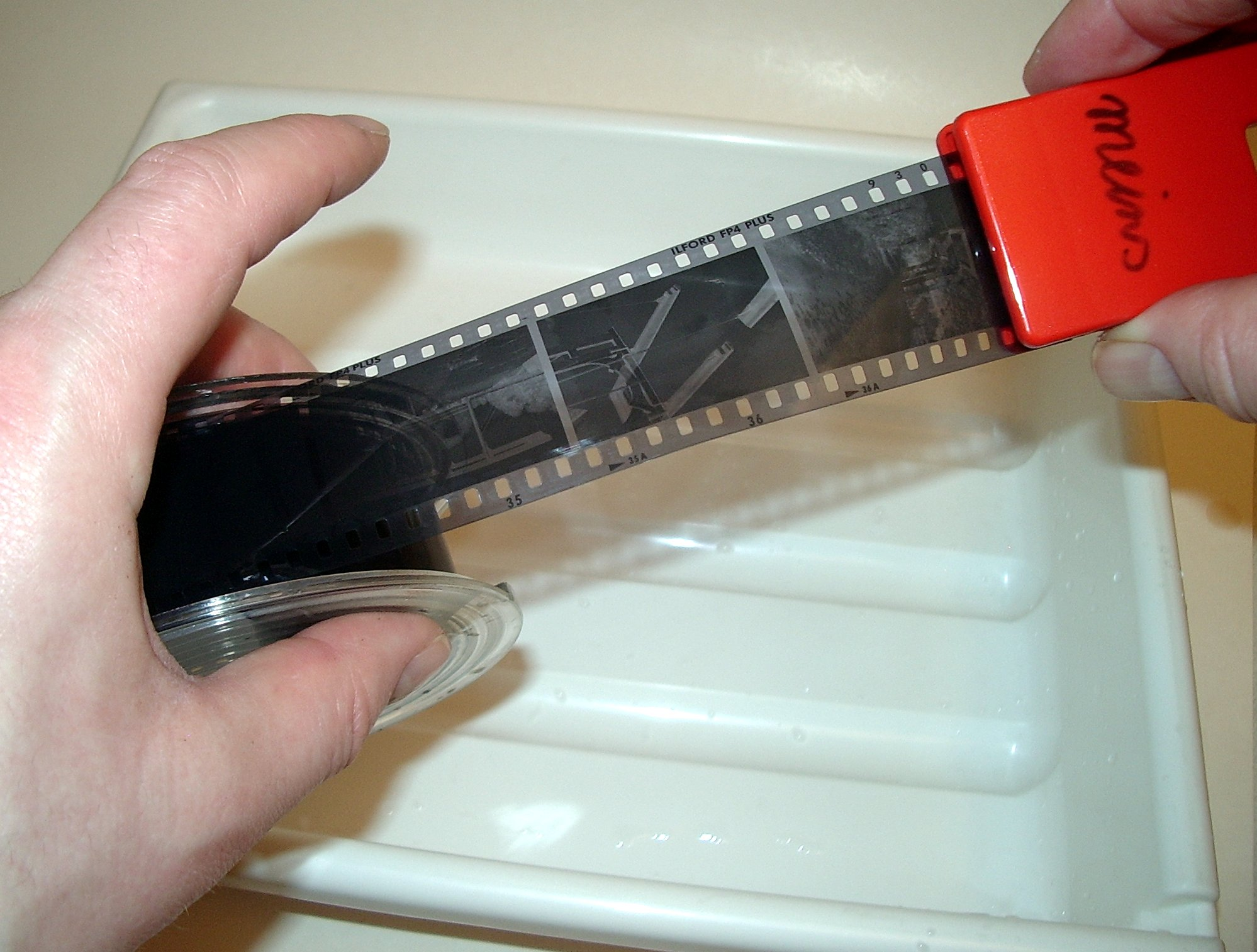 Agfa Rondinax 35 U / Zum Aufhängen des Films für die Trocknung eine Filmklammer anheften - Agfa Rondinax 35 U / Applying a film clip for hanging up the film for drying .